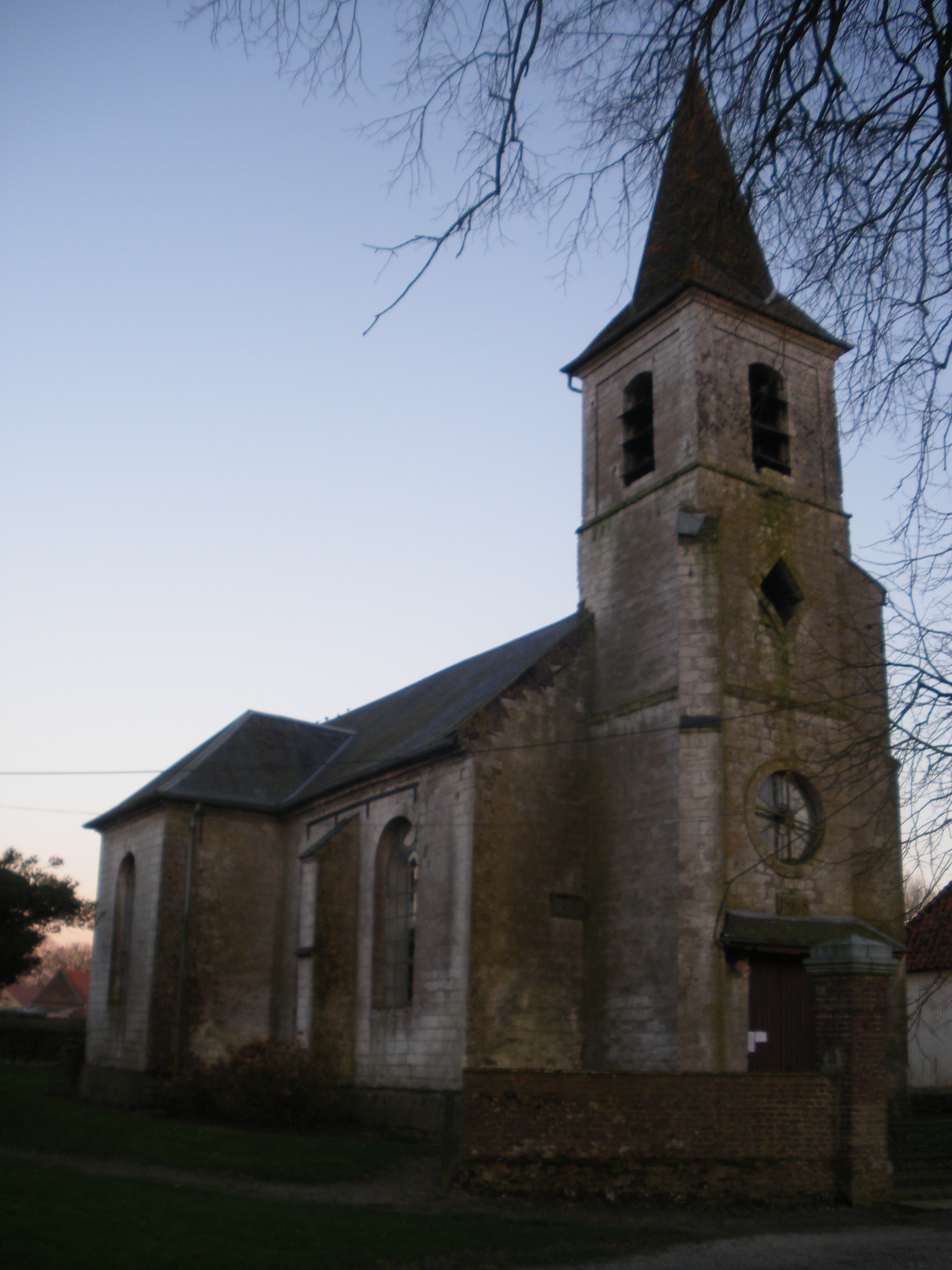 Vue de l'église Saint-François d'Assise de Chériennes.